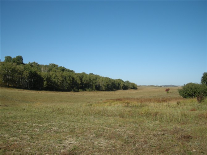 乌兰布统元宝山村北侧草甸